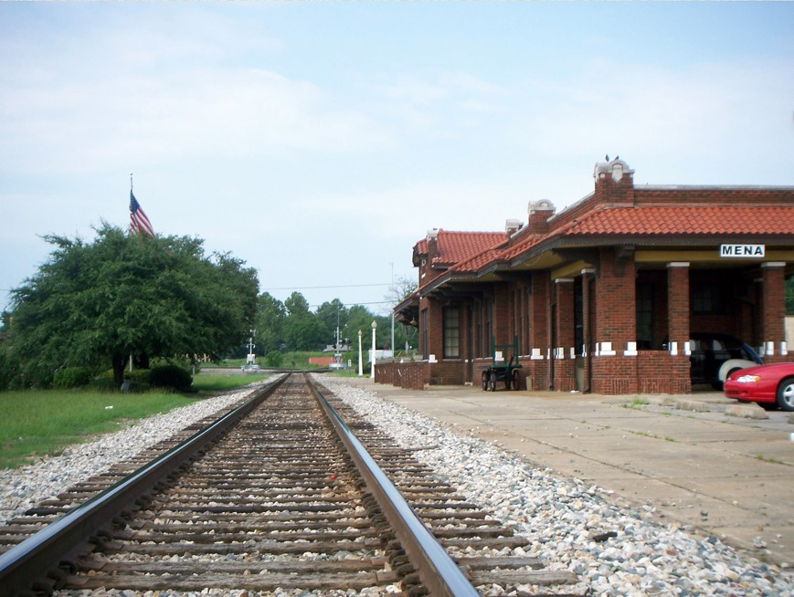 Railroad depot, Mena, Arkansas.